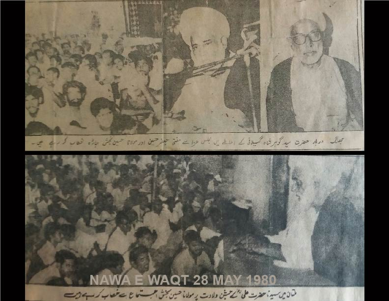 جھنگ اور ملتان میں خطابت کے یادگار لمحات، روزنامہ نوائے وقت 28 مئی 1980